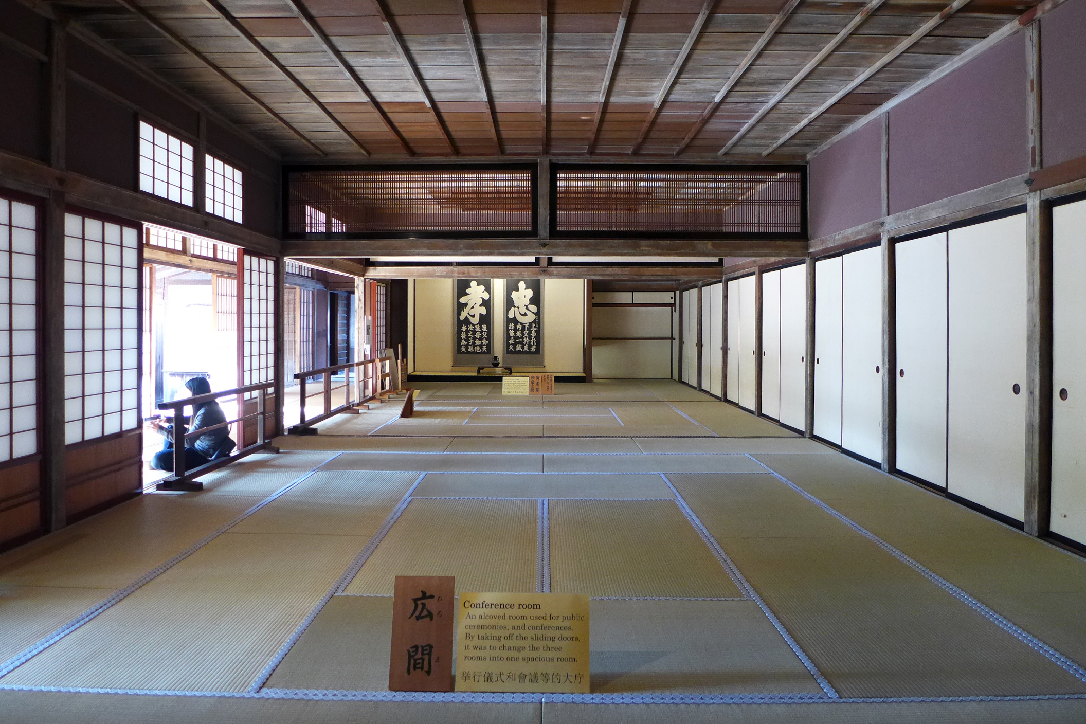 Takayama Jinya Conference Room